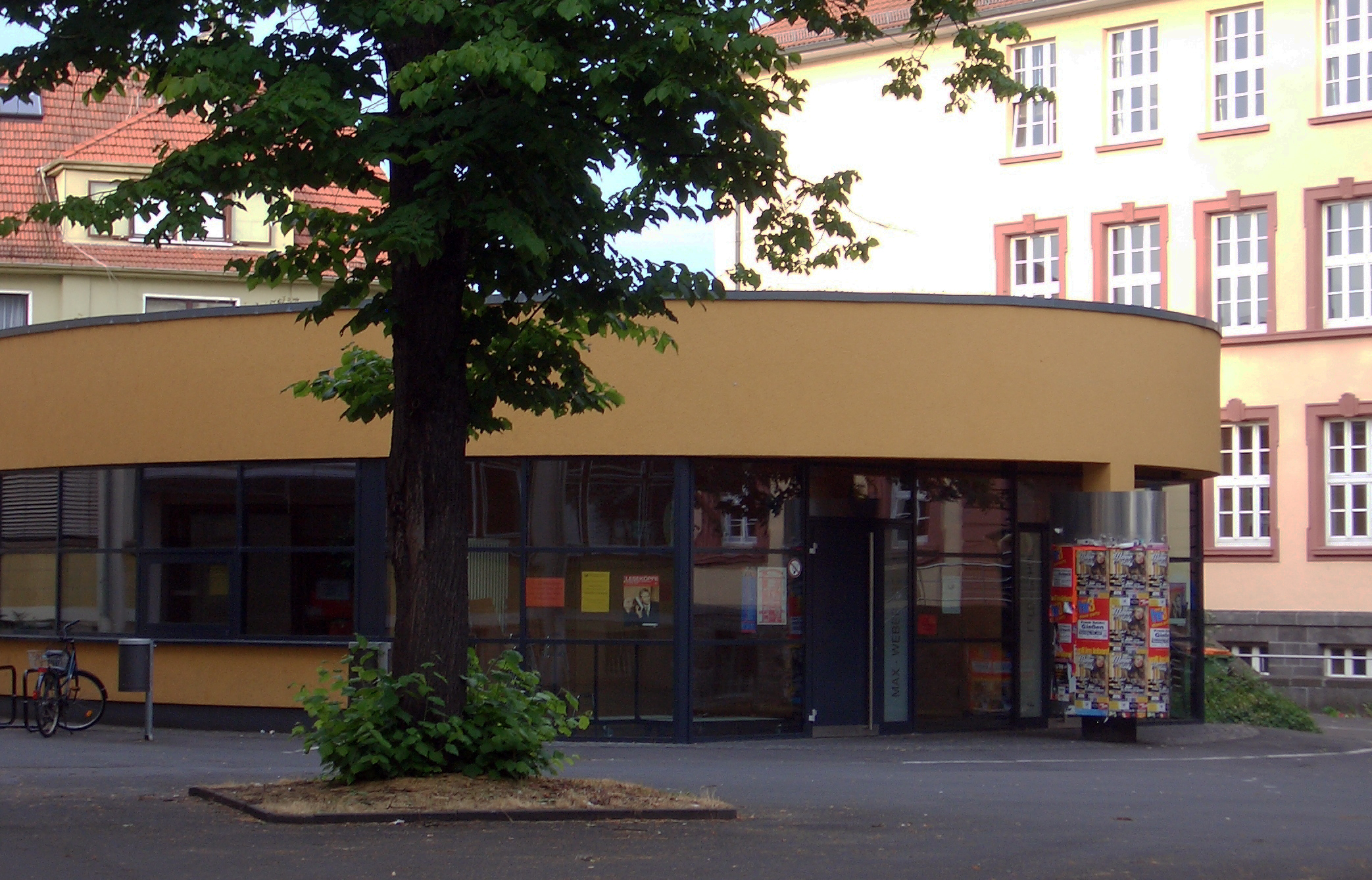 Aula der FFS